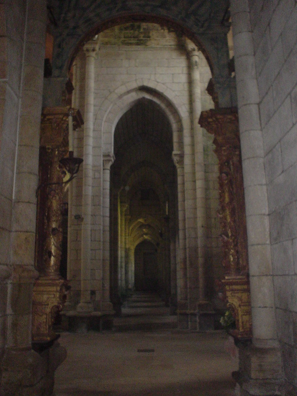 Kloster Oseira, Blick von Westen in das nördliche Seitenschiff